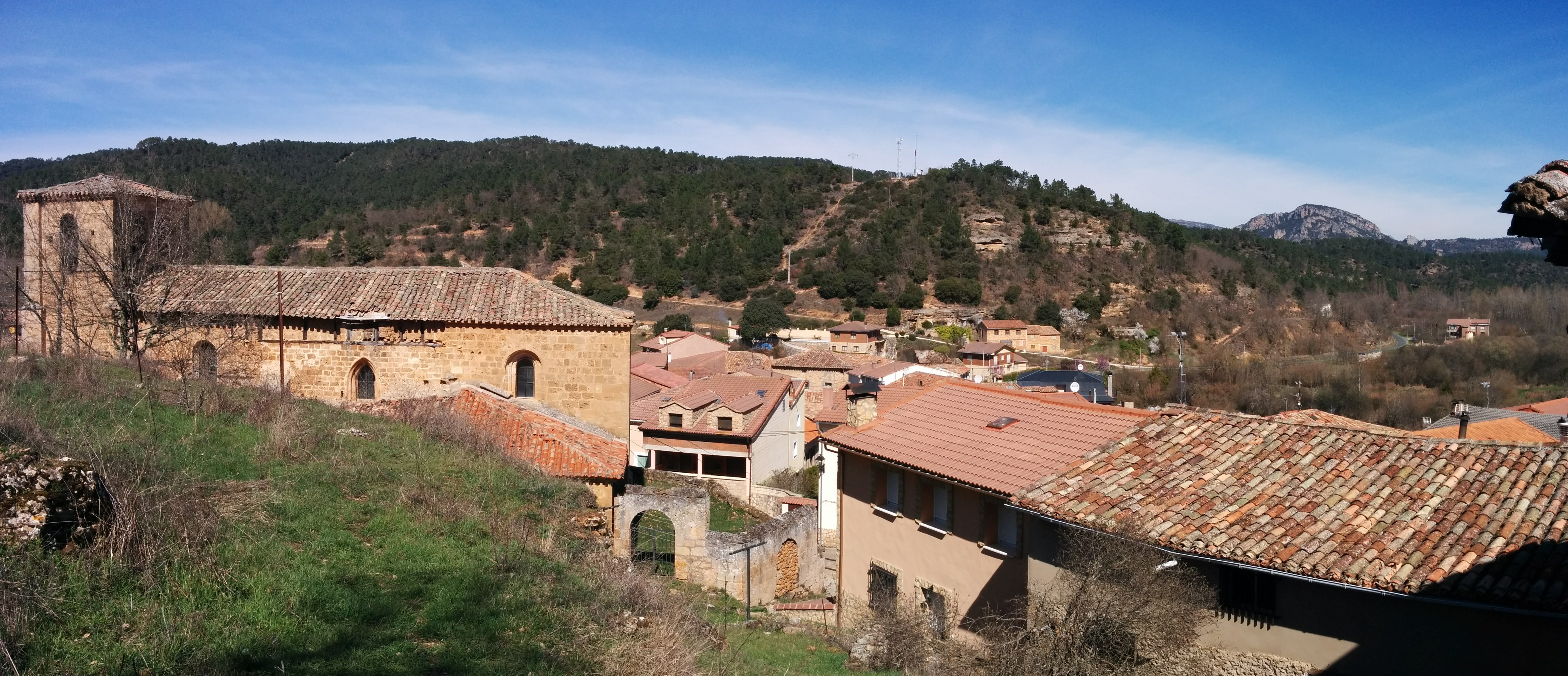 Vista general de Padrones de Bureba (Burgos, España).